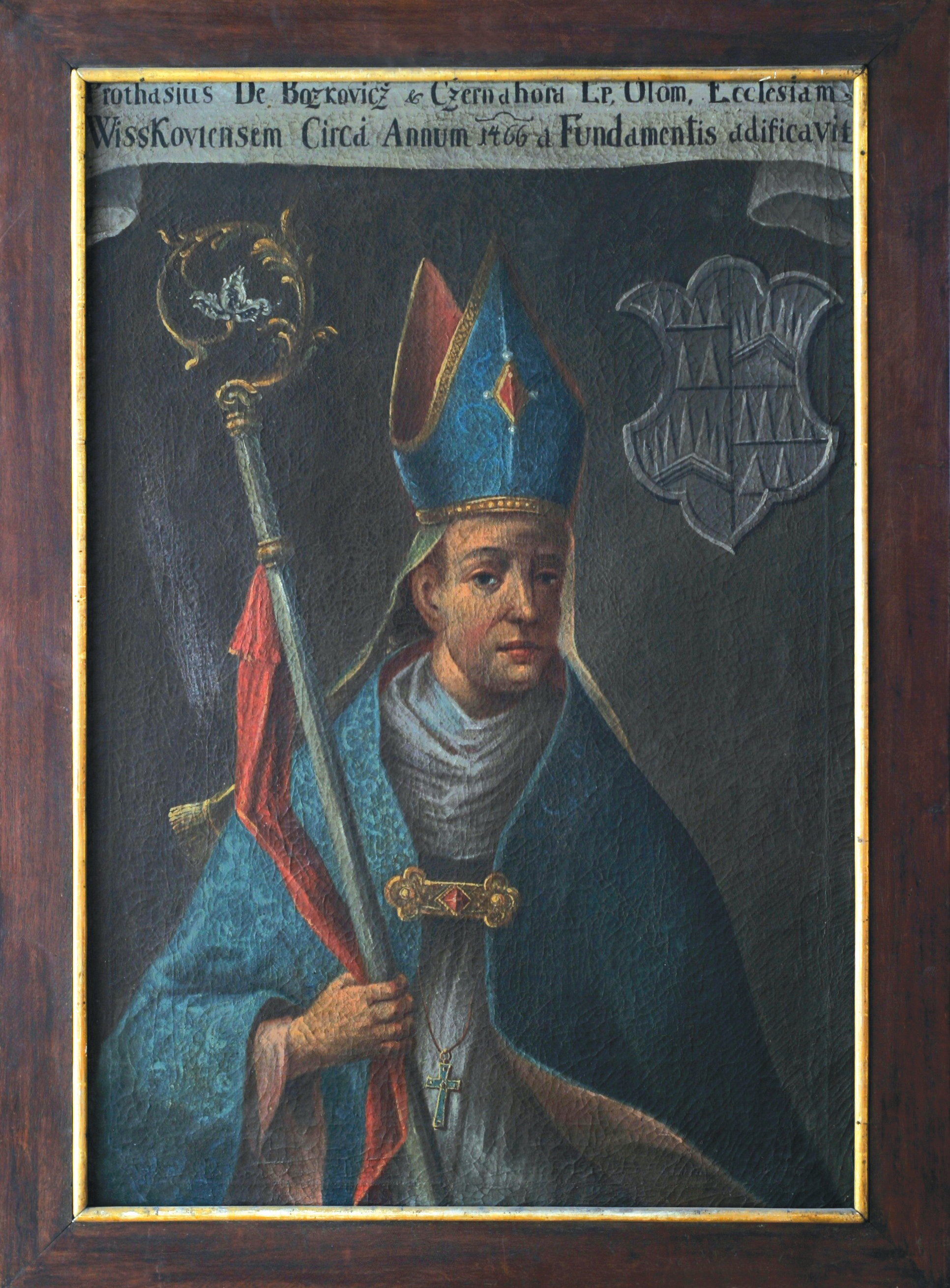 Česky: olomoucký biskup Tas z Boskovic.